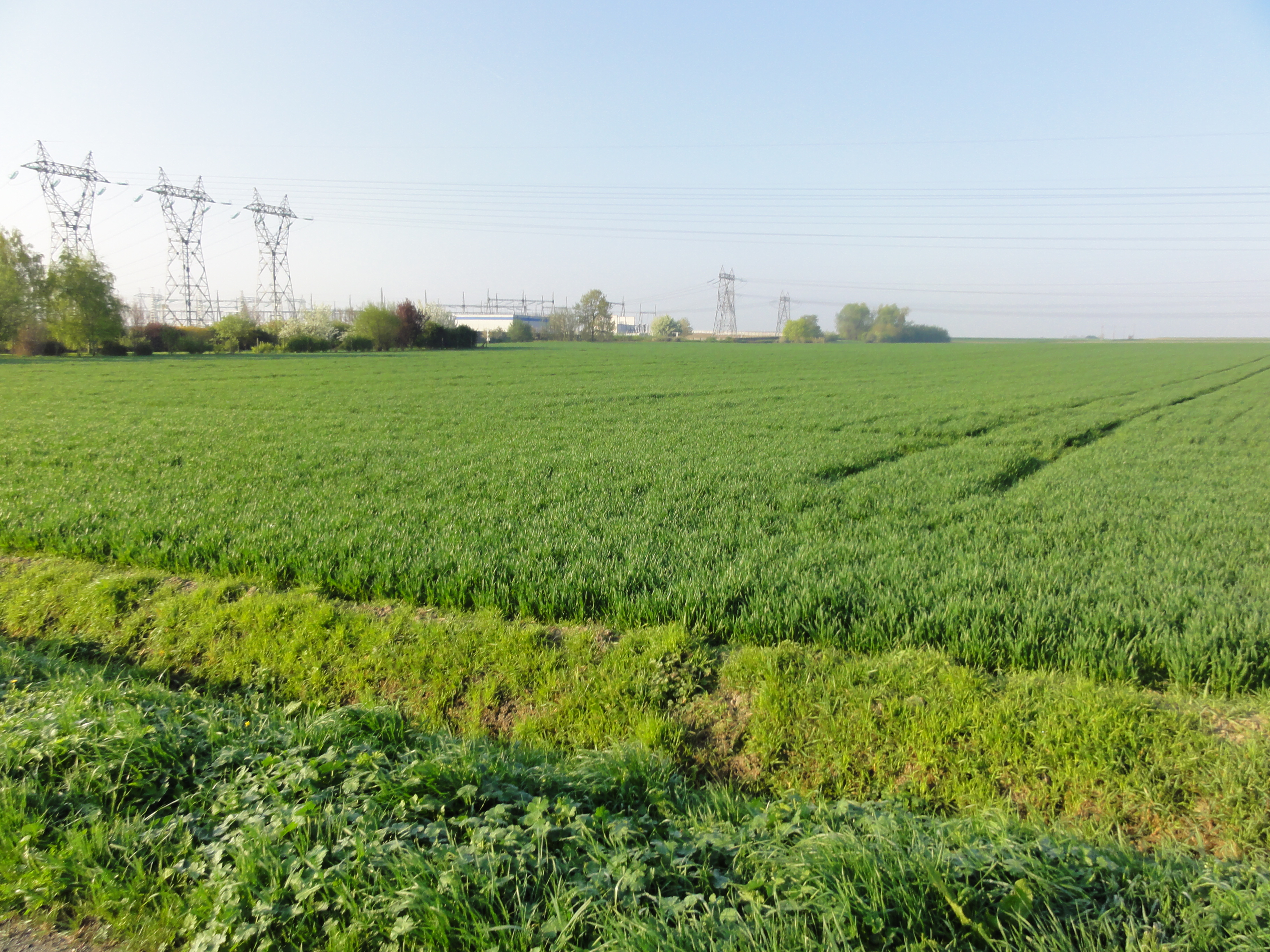 La Fosse de Mastaing de la Compagnie des mines d'Aniche était un charbonnage constitué d'un seul puits situé à Mastaing, Nord, Nord-Pas-de-Calais, France.